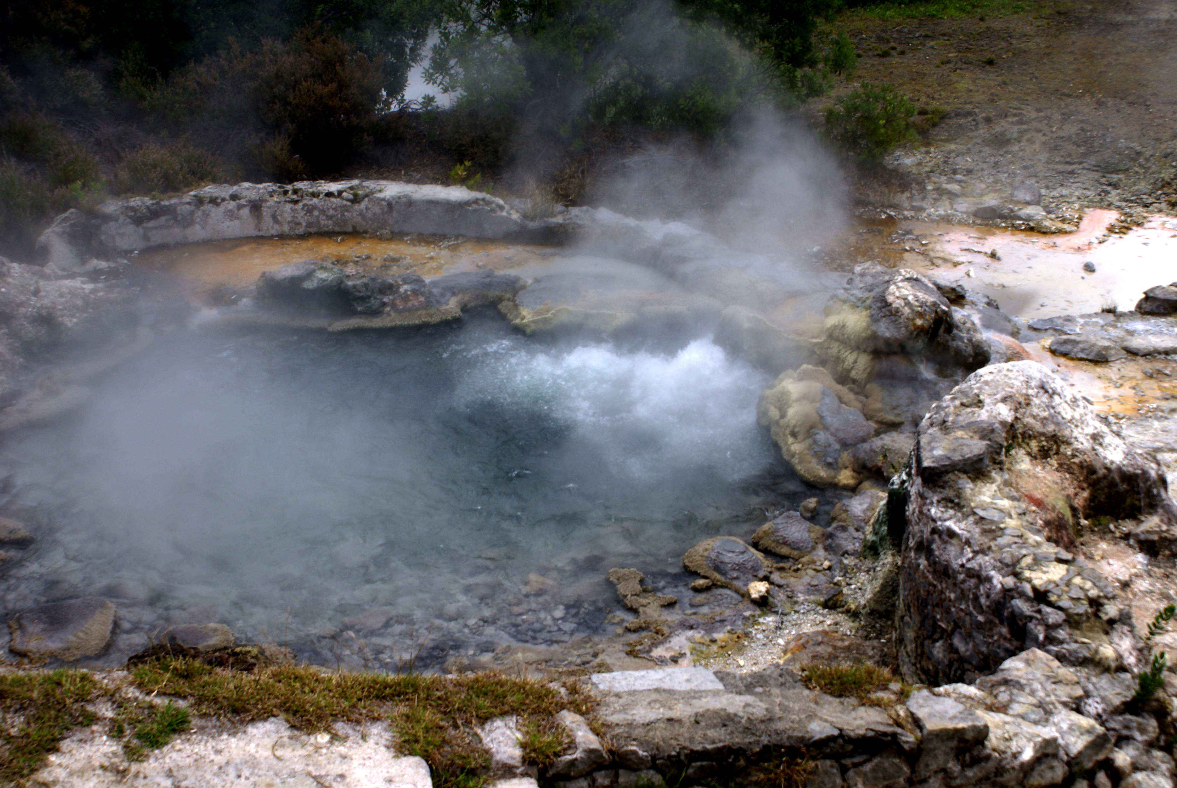 Caldeira fervendo, Vale das Furnas, Povoação, ilha de São Miguel, Açores